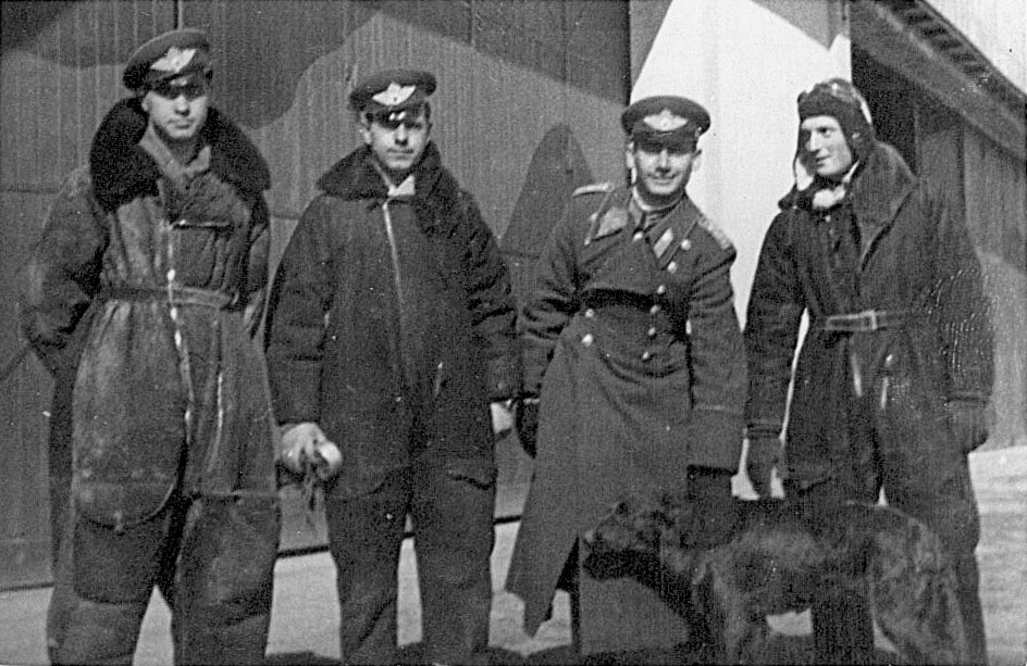 Спомен с любимото куче на любимия инстурктор...